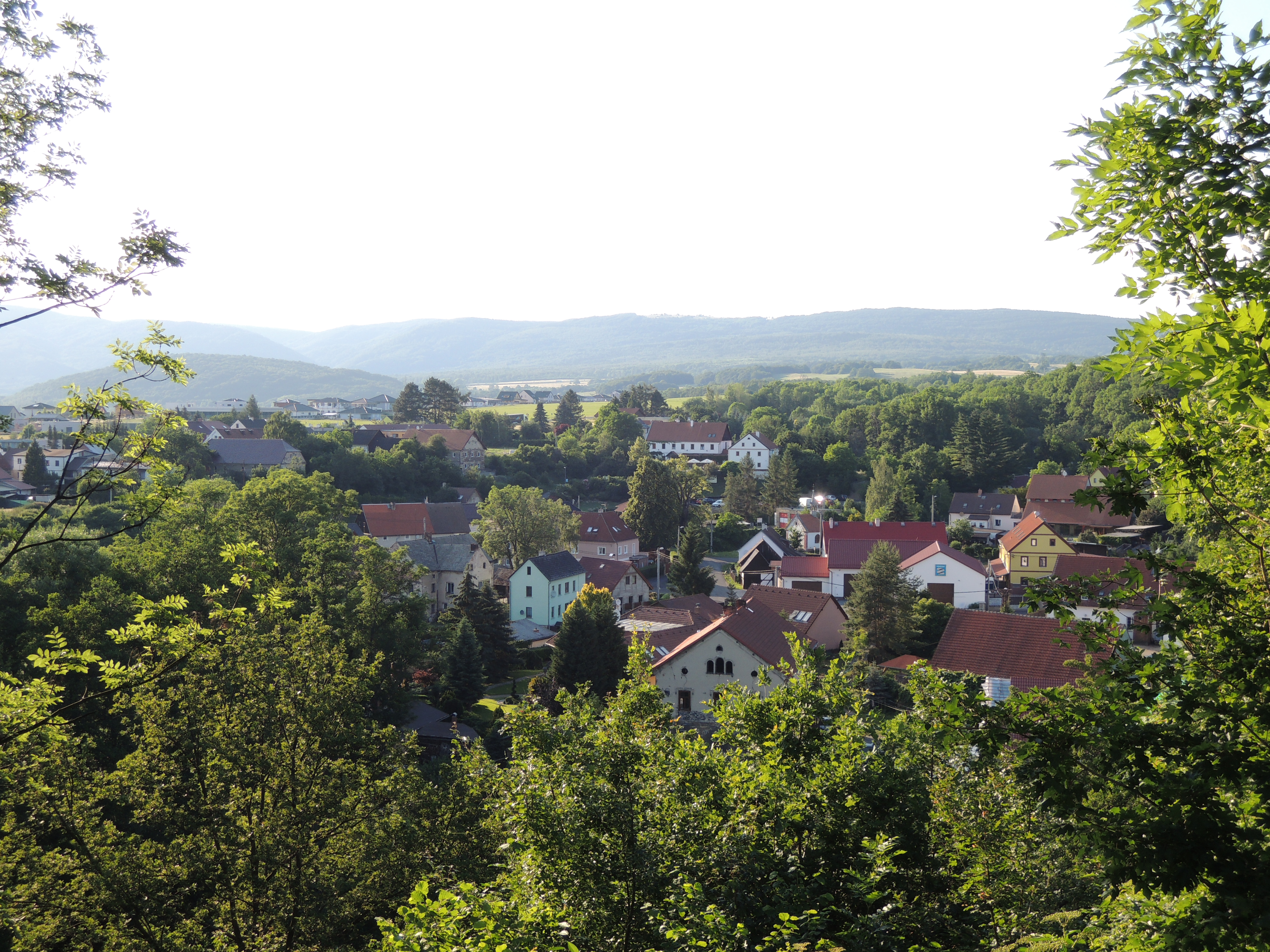 Pohled na část Božtěšice